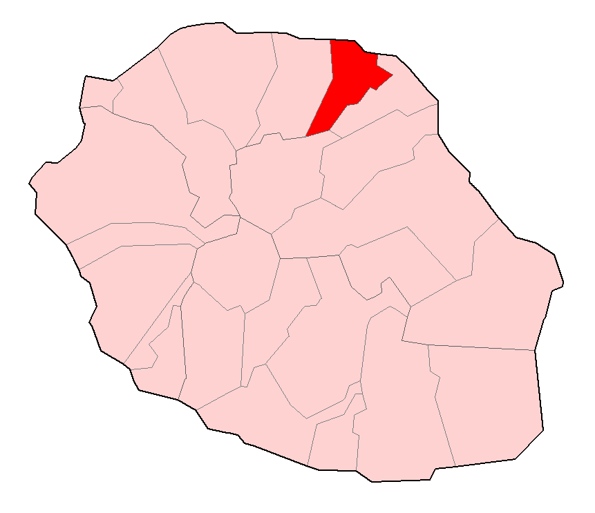 Carte de la Réunion permettant de localiser Sainte-Suzanne.